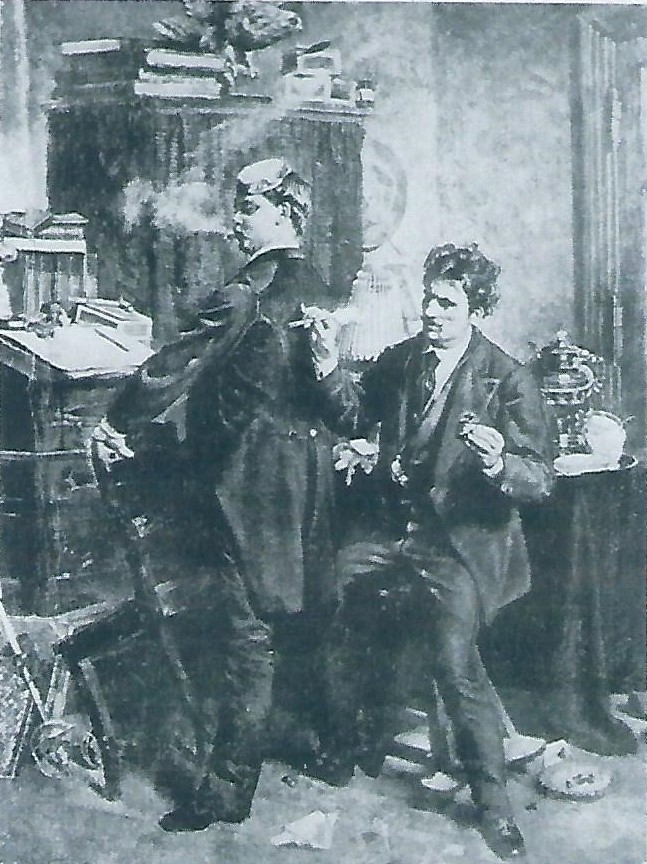 Fotografie eines verschollenen Ölbildes von Georg Knorr: Vor dem Ball.